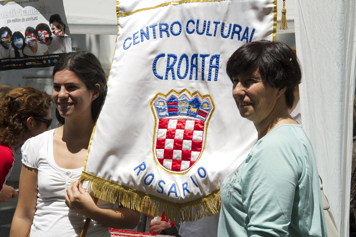 La celebración, coordinada por la Dirección de Relaciones Institucionales de la Secretaría General del Gobierno y la Unión de Asociaciones Croatas de la República Argentina, se realizó entre las 13 y las 17 en Av. de Mayo, entre Bolívar y Chacabuco donde hubo diversas actividades presentadas por esa comunidad europea. ( Foto: Estrella Herrera)